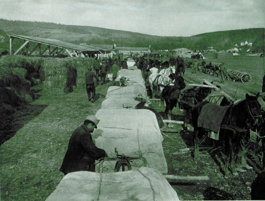 Endstation der von den Eisenbahnern des VII. Korps errichteten Feldbahn Varannö—Kelcse (Österreich-Ungarn in Waffen, Mappe 1, In den Karpathen, Blatt 29)